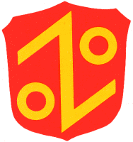 Herb miasta Koszalina obowiązujący od 31 sierpnia 1938 do 10 lutego 1959